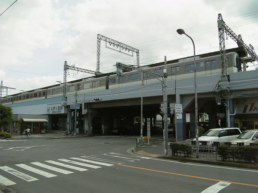 近鉄奈良線八戸ノ里駅 2006年9月撮影。 機材：V604SH 撮影者：Kansai explorer